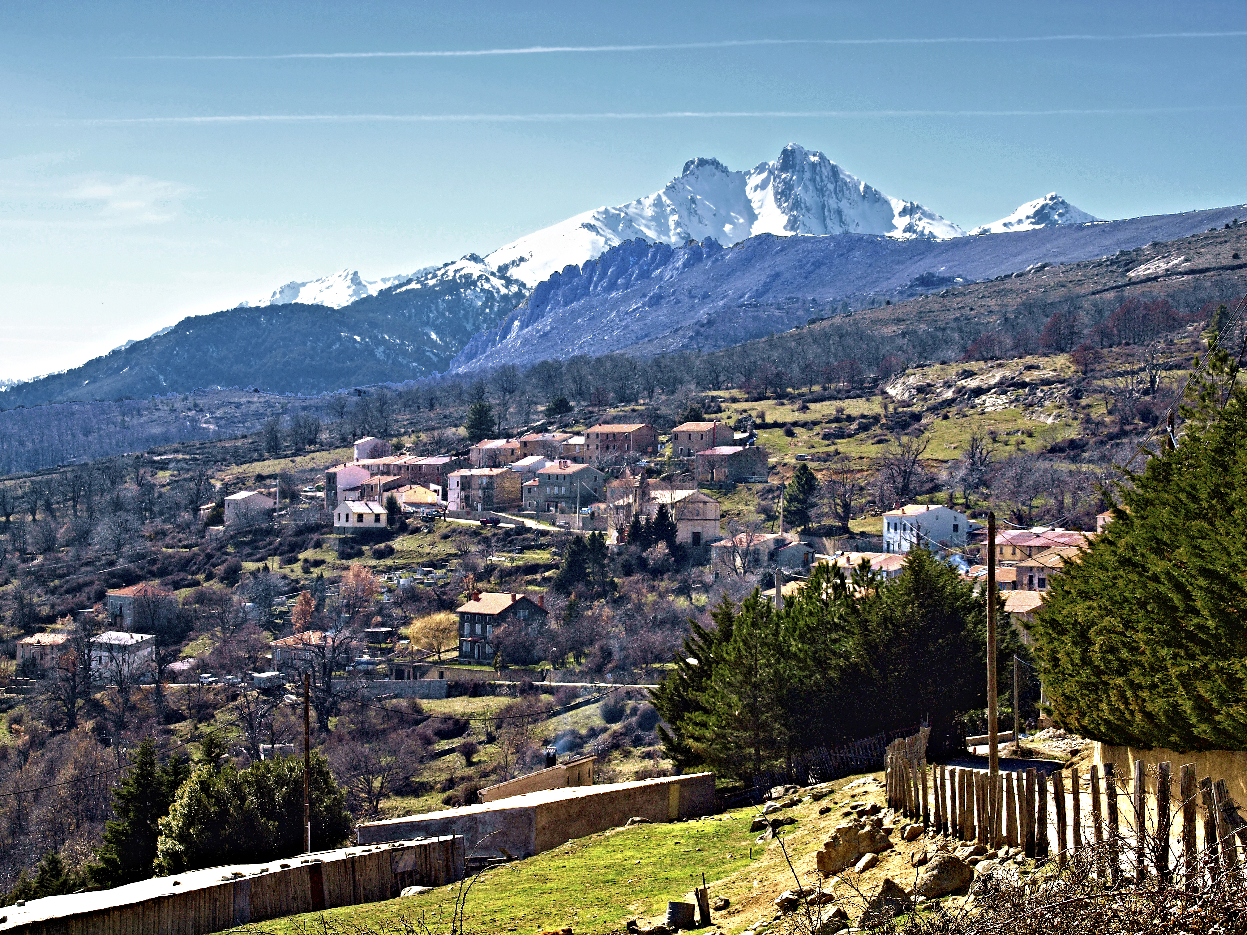 Lozzi (Corsica) - Vue du village